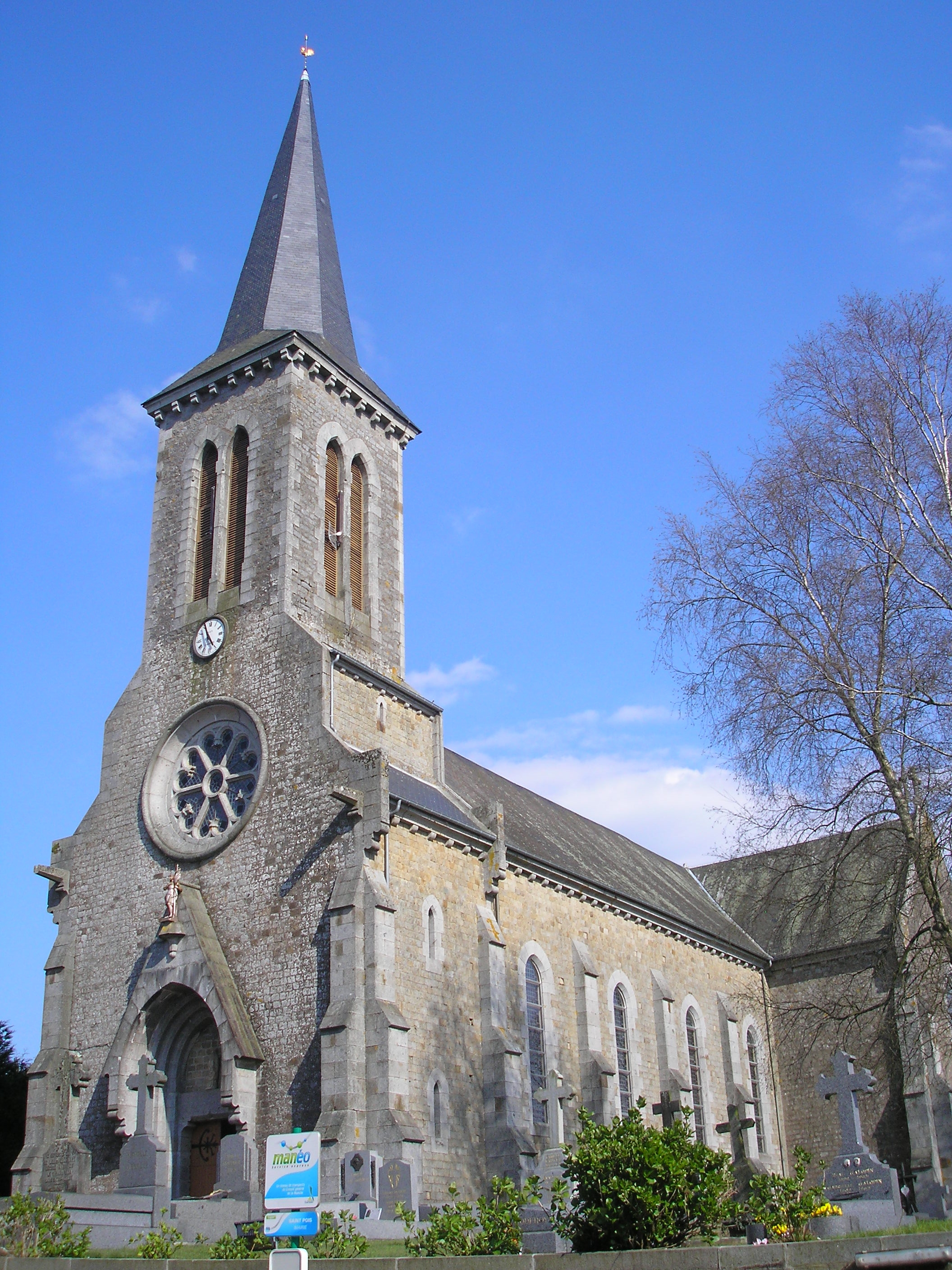 Saint-Pois (Normandie, France). L'église.